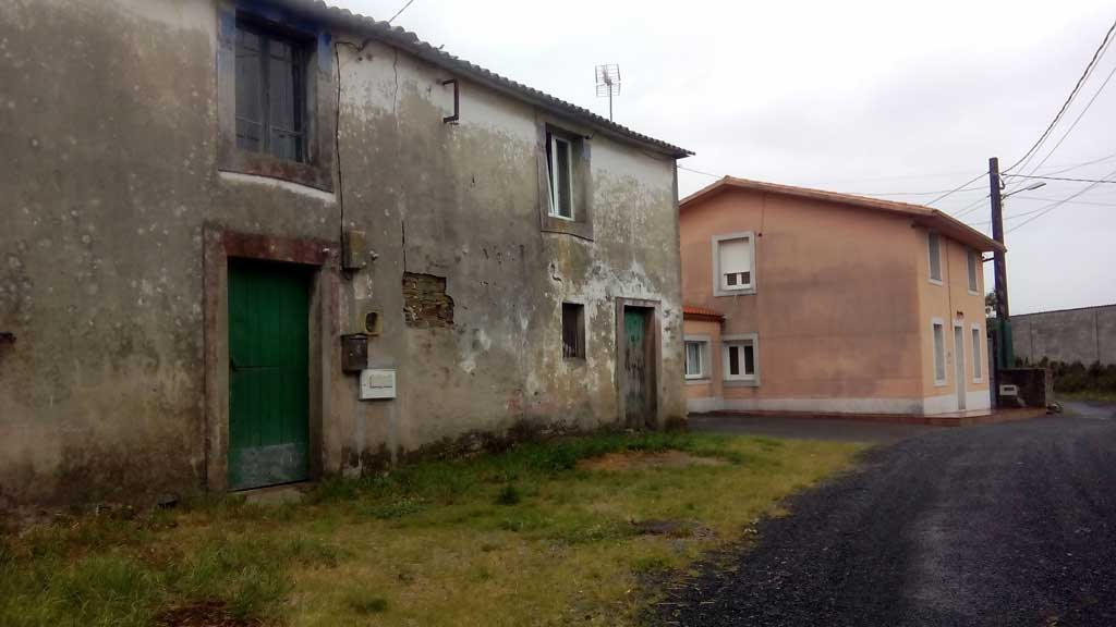 Vista do Carabuchal, Narón.